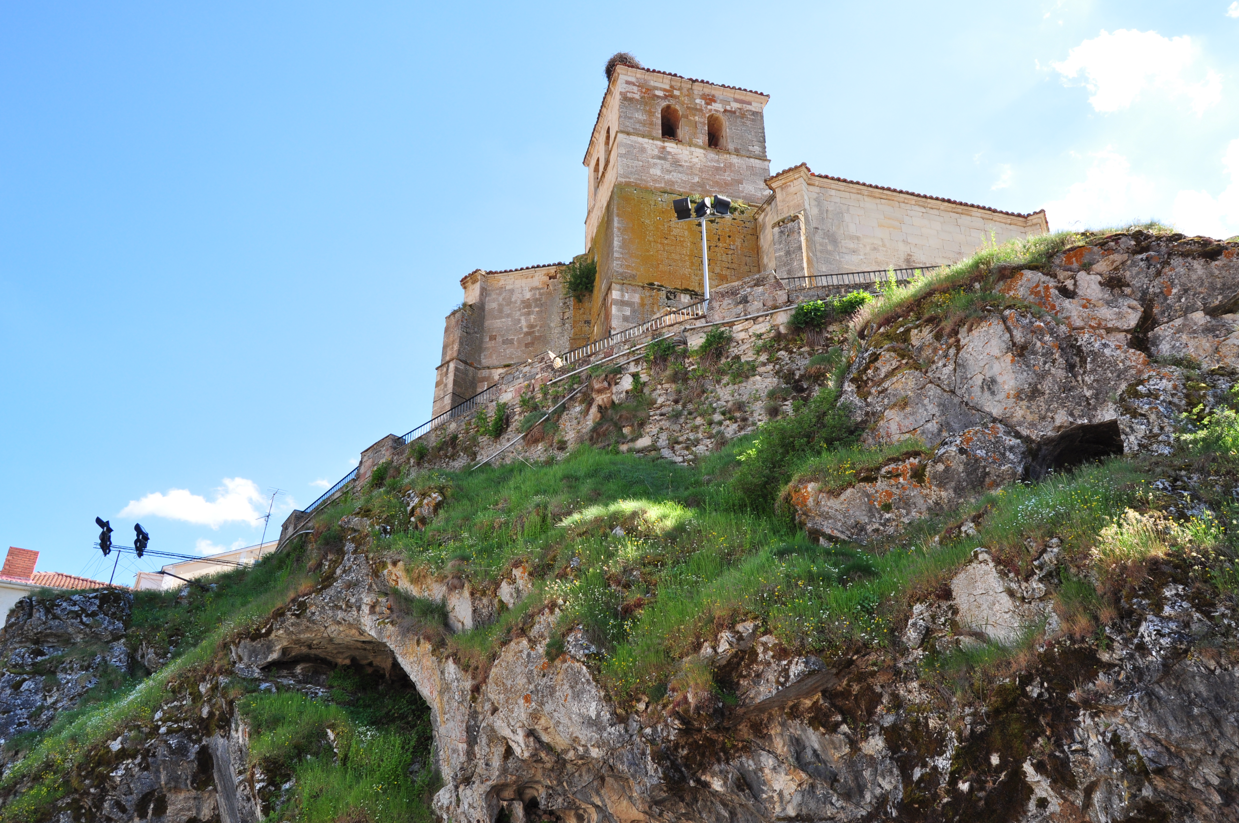 Cervera de Pisuerga - 019